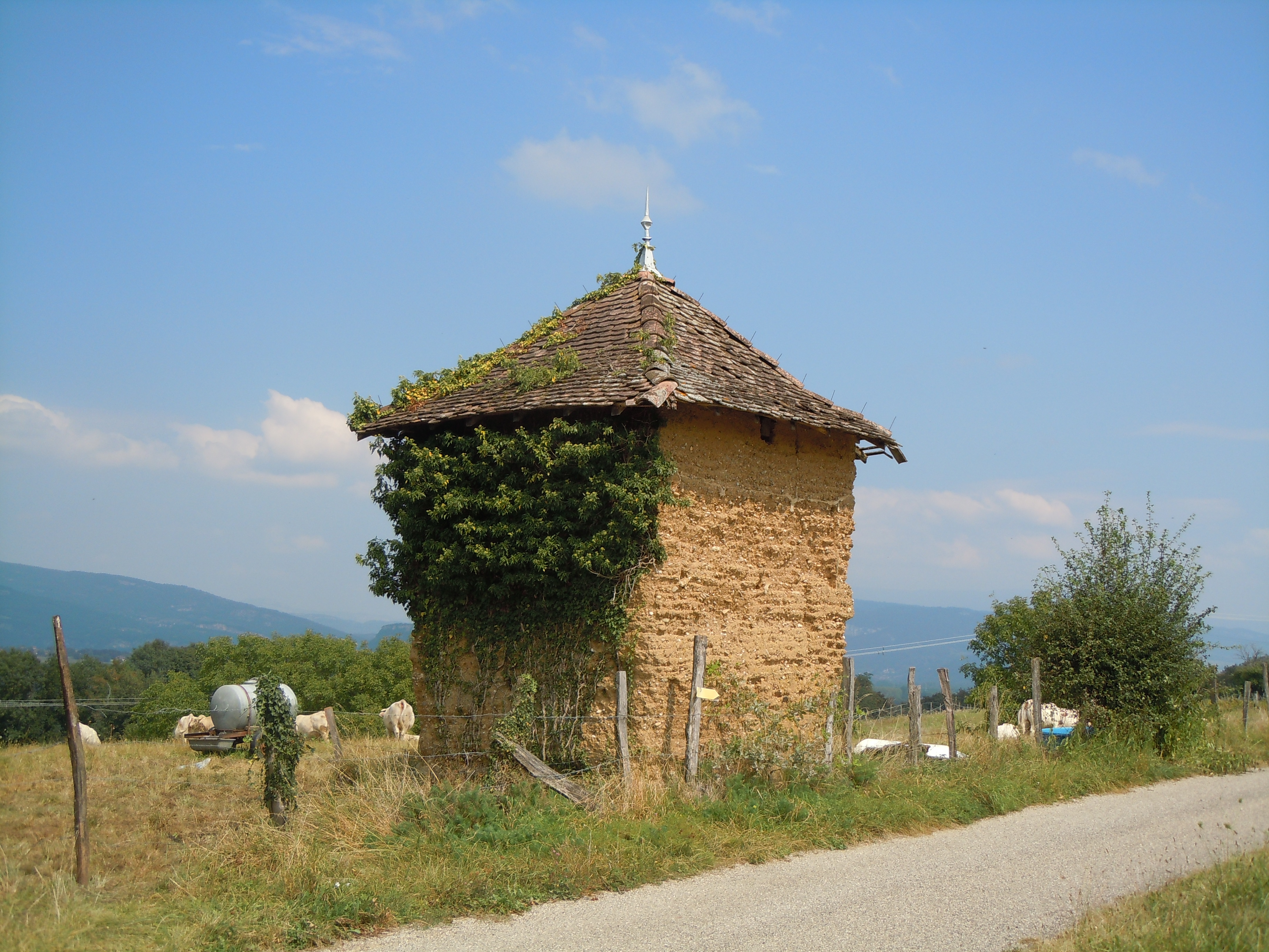 Grange en Pisé abandonnée à Granieu - lieu-dit de la Berdelière - Isère